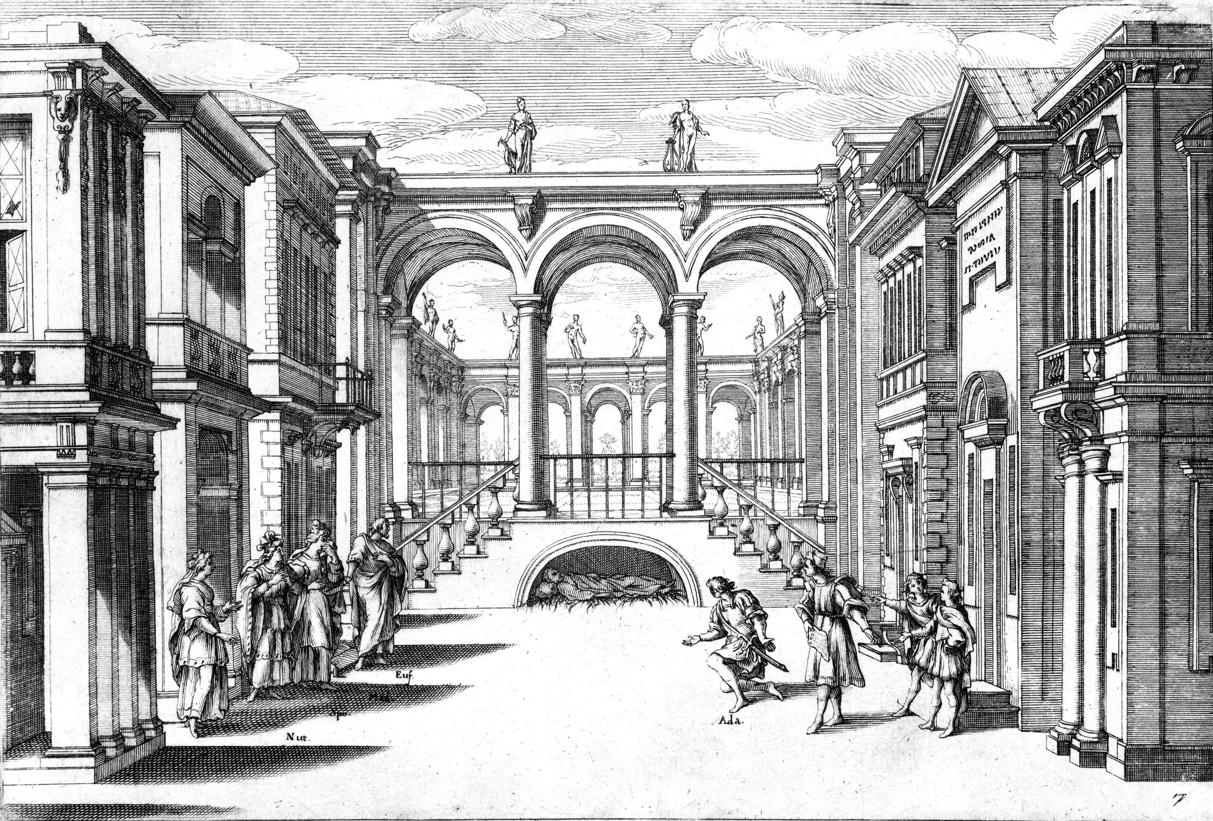 Stefano Landi - Il Sant'Alessio - Rome 1634 - Plate 7 without proscenium